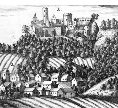 Alte Ansicht der Burg Plesse